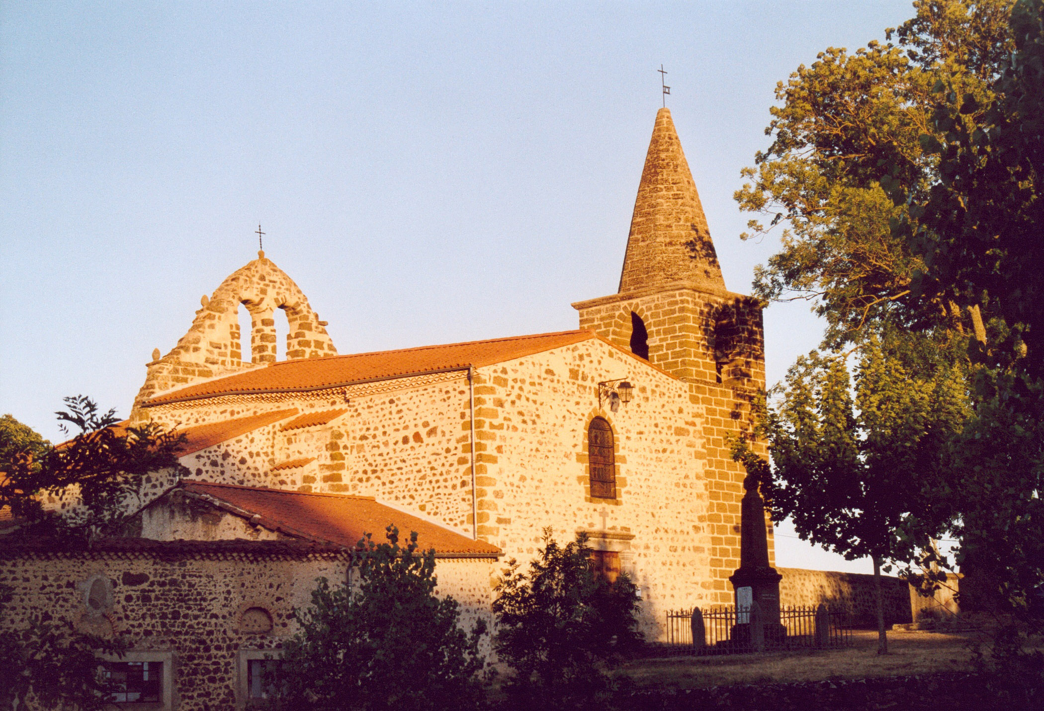 Cerzat Haute-Loire Photographie prise par GIRAUD Patrick